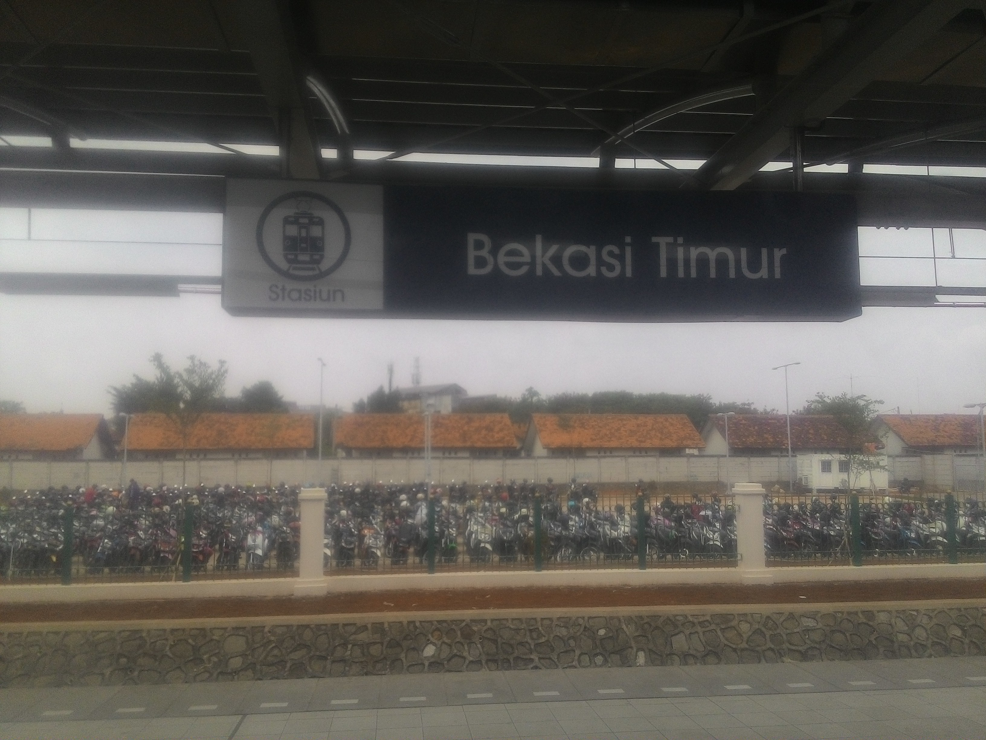 Papan Nama Stasiun Bekasi Timur Terbaru 2017